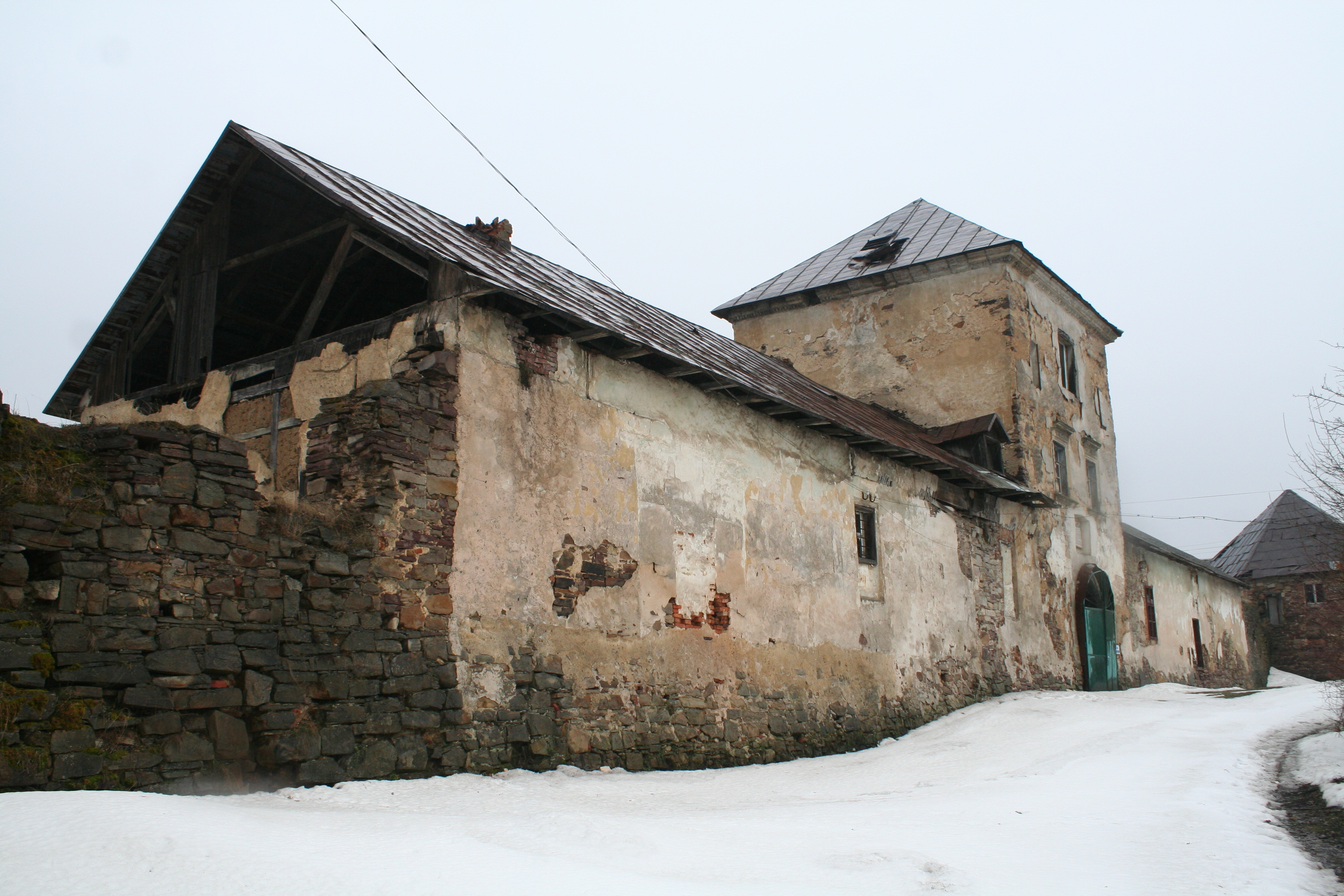 смт. Золотий Потік, Бучачцький р-он, Золотопотіцький замок (мур.), загальний вигляд, мури біля надбрамної вежі